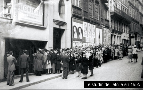 entrée du Studio de l'Etoile ( Troyon Paris XVII en 1955